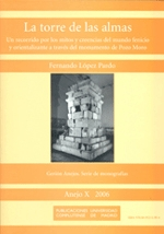 Portada Gerión: La Torre de las Almas de F. López Pardo